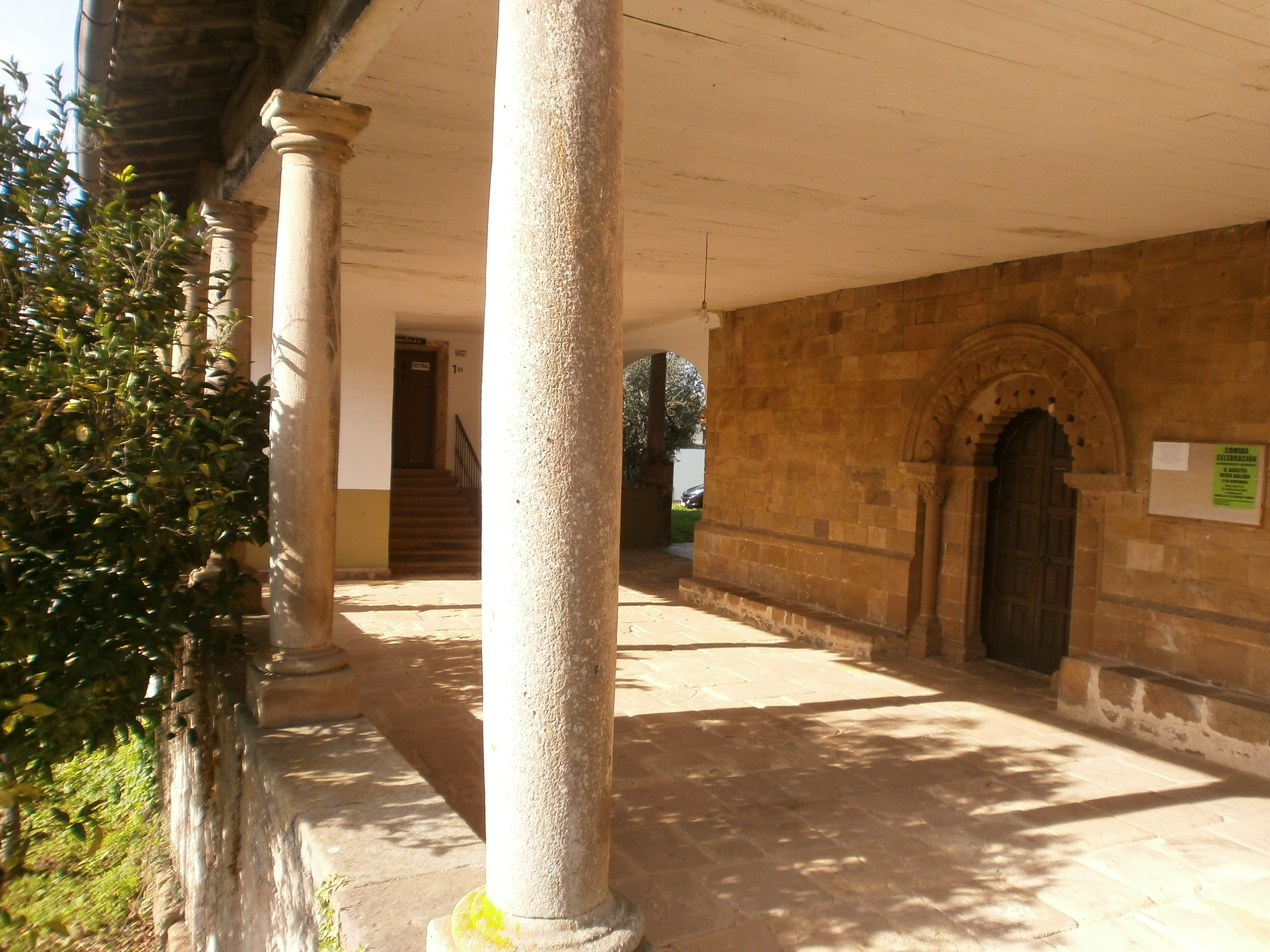 Vista del átrio sur.